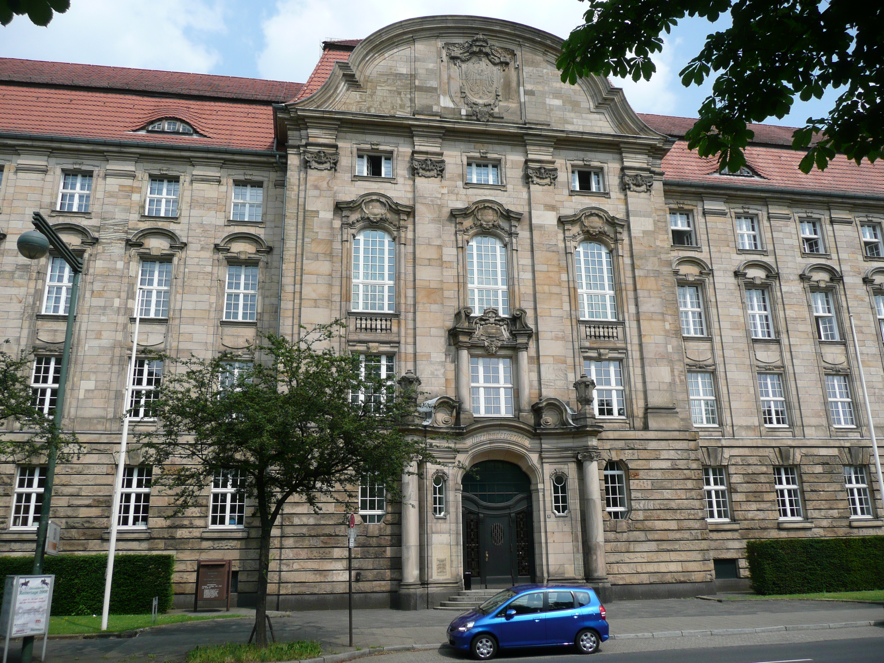 Gebäude des Oberlandesgerichts Düsseldorf, Mittelrisalit mit Hauptportal